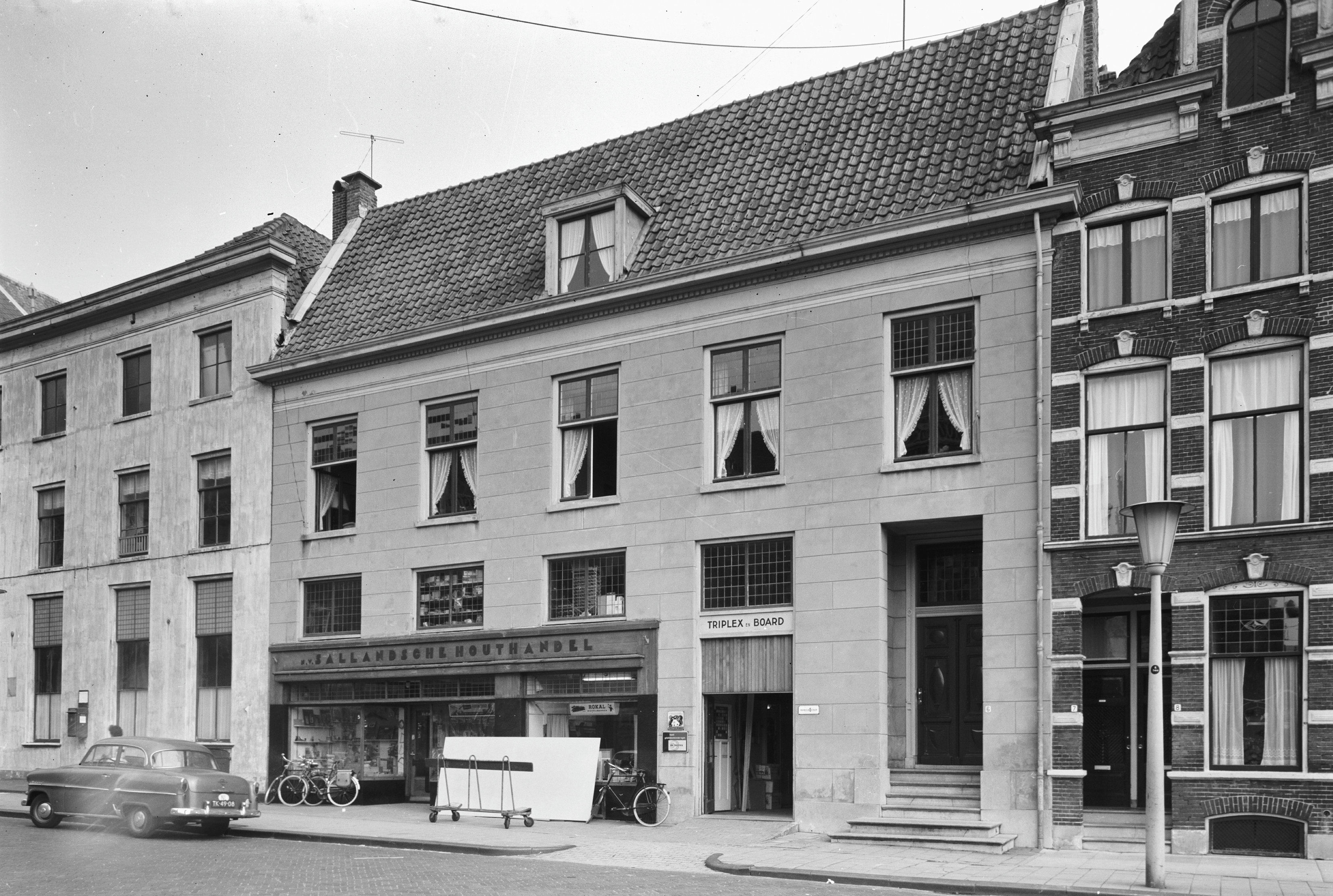 Voorgevel. Tot 1839 Latijnse school, daarna patricierswoning, later woning/winkel/werkplaats